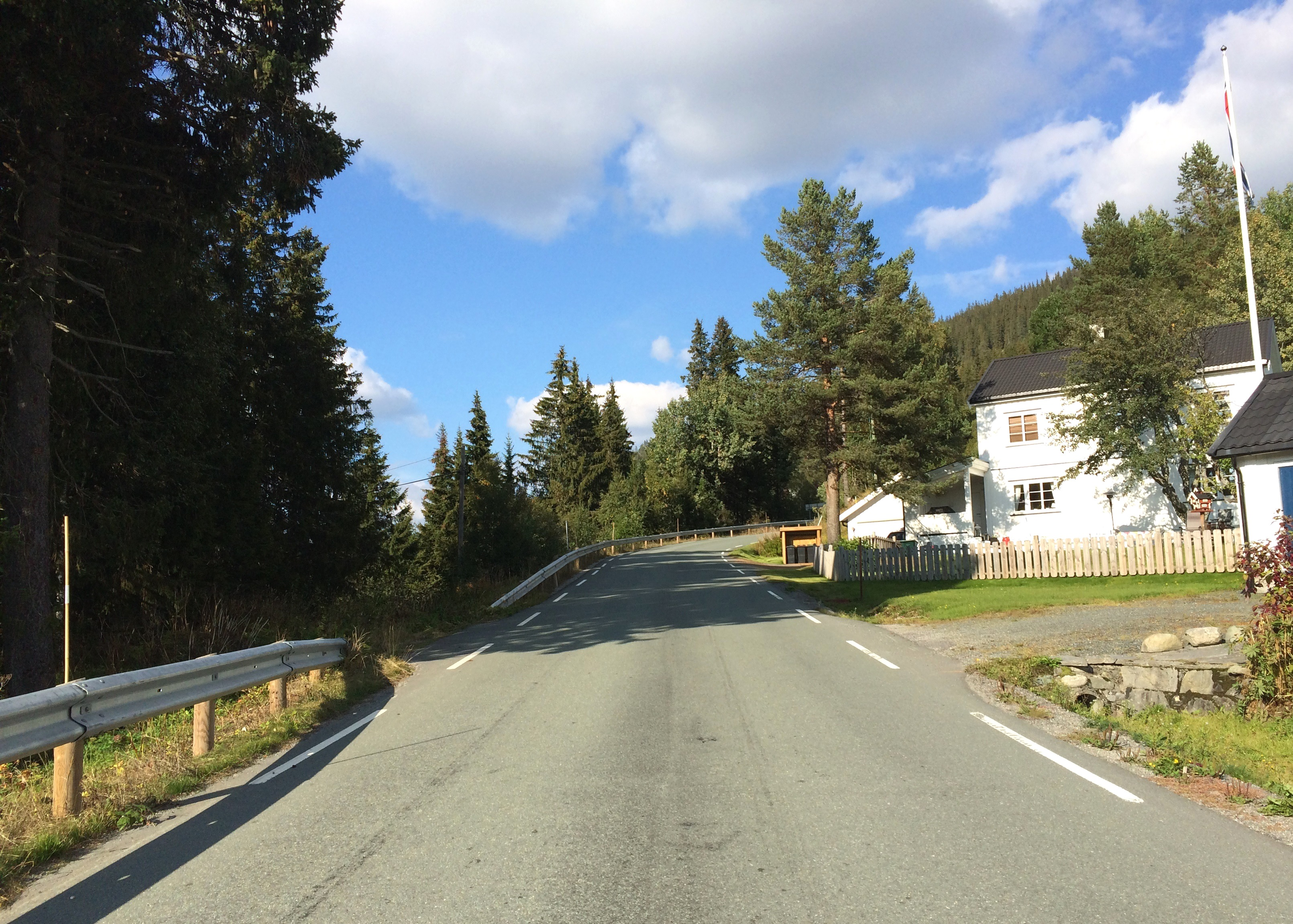 Øyfjellvegen (fylkesvei 801) like nord for Høydalsmo